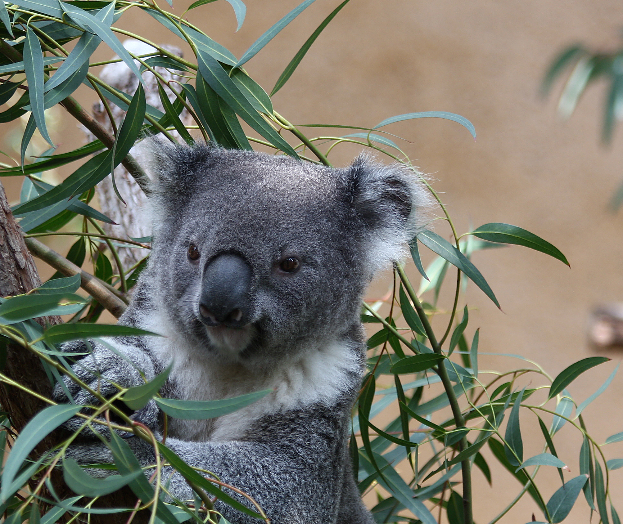 Koala at Greater Los Angeles Zoo